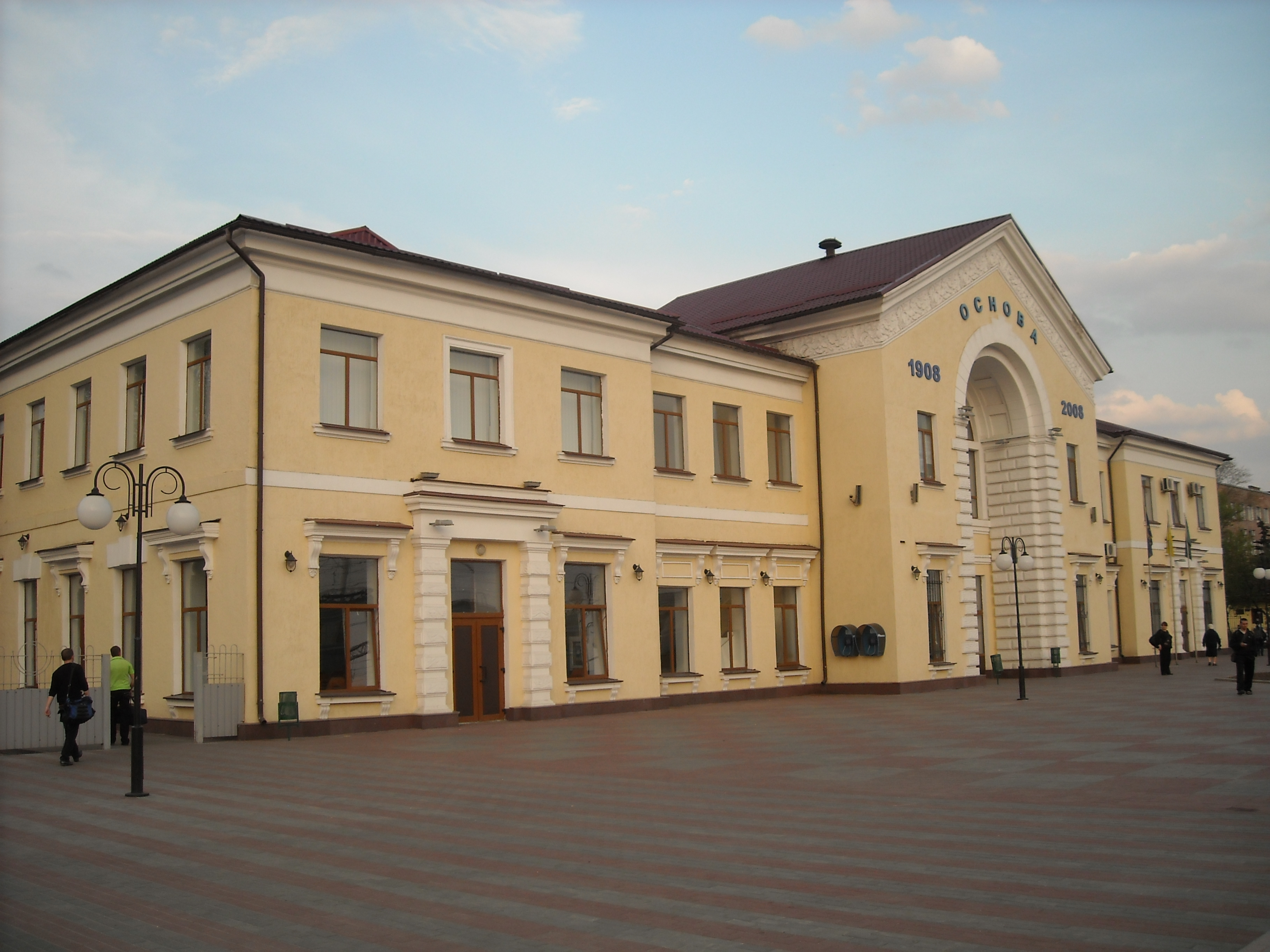 Харьков. Основа. Станция Основа. Вокзал. 1908 год.